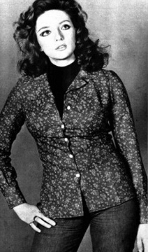 Italian singer Daniela Davoli